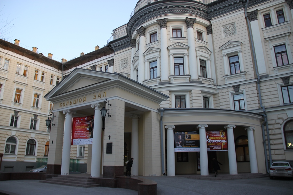 Главный вход в здание консерватории